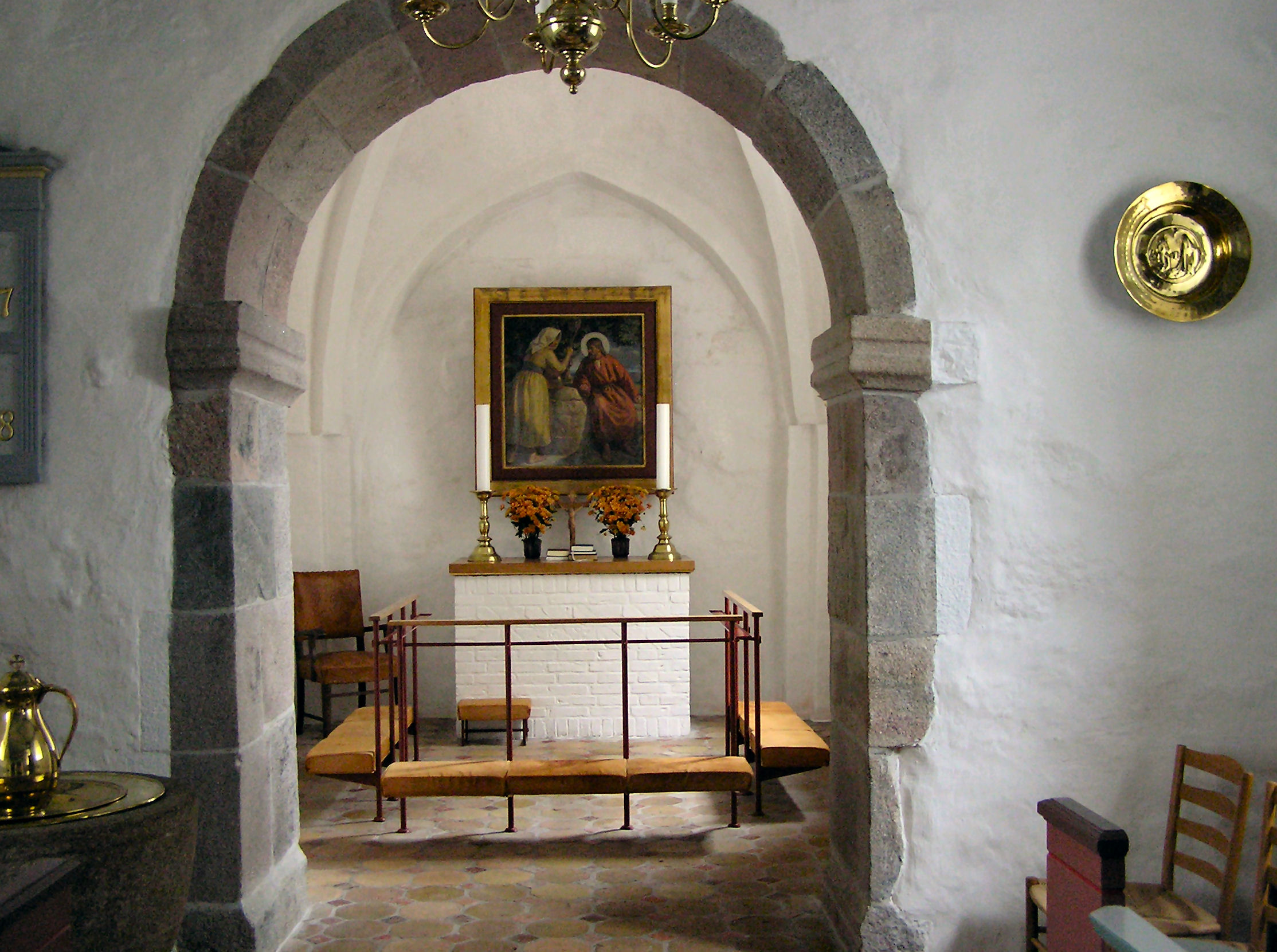 Ulsted Kirke,Aalborg Stift